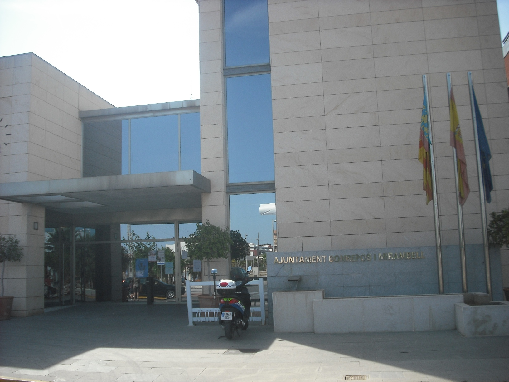 Ajuntament.